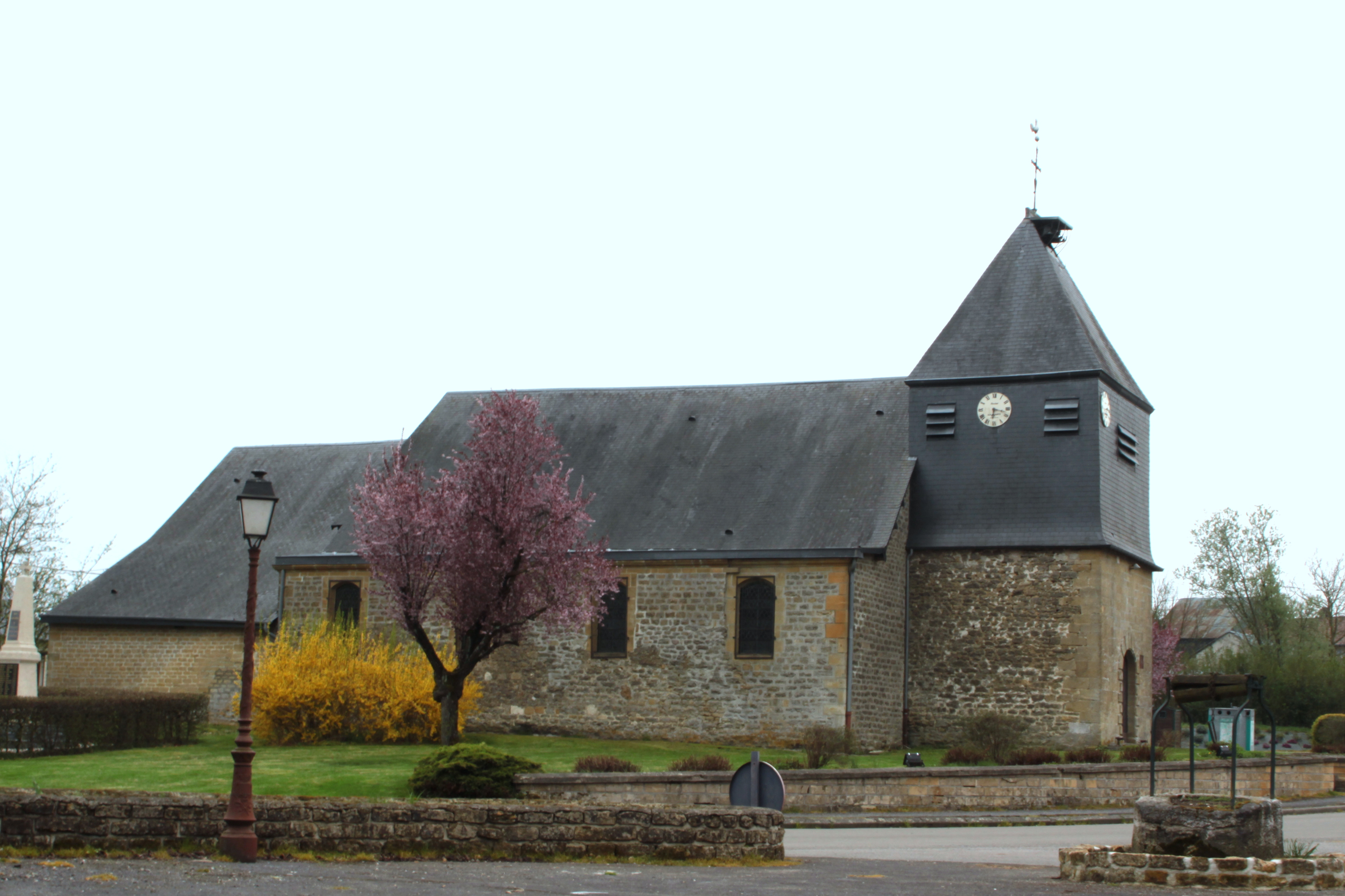 D'Kierch vu Sauville